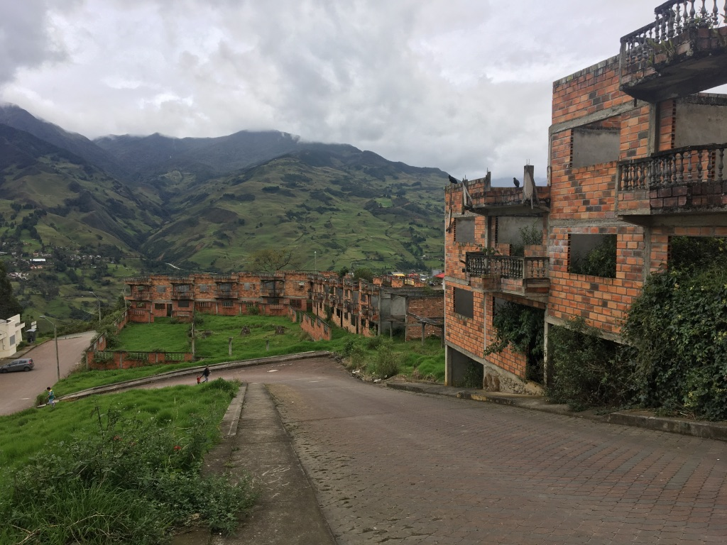 Por la masiva migración que existió, las familias abandonaron sus viviendas. Incluso, algunas familias abandonaron sus viviendas aún en proceso de construcción.